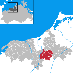 Amt Warnow-Ost in Mecklenburg-Vorpommern - District Bad Doberan